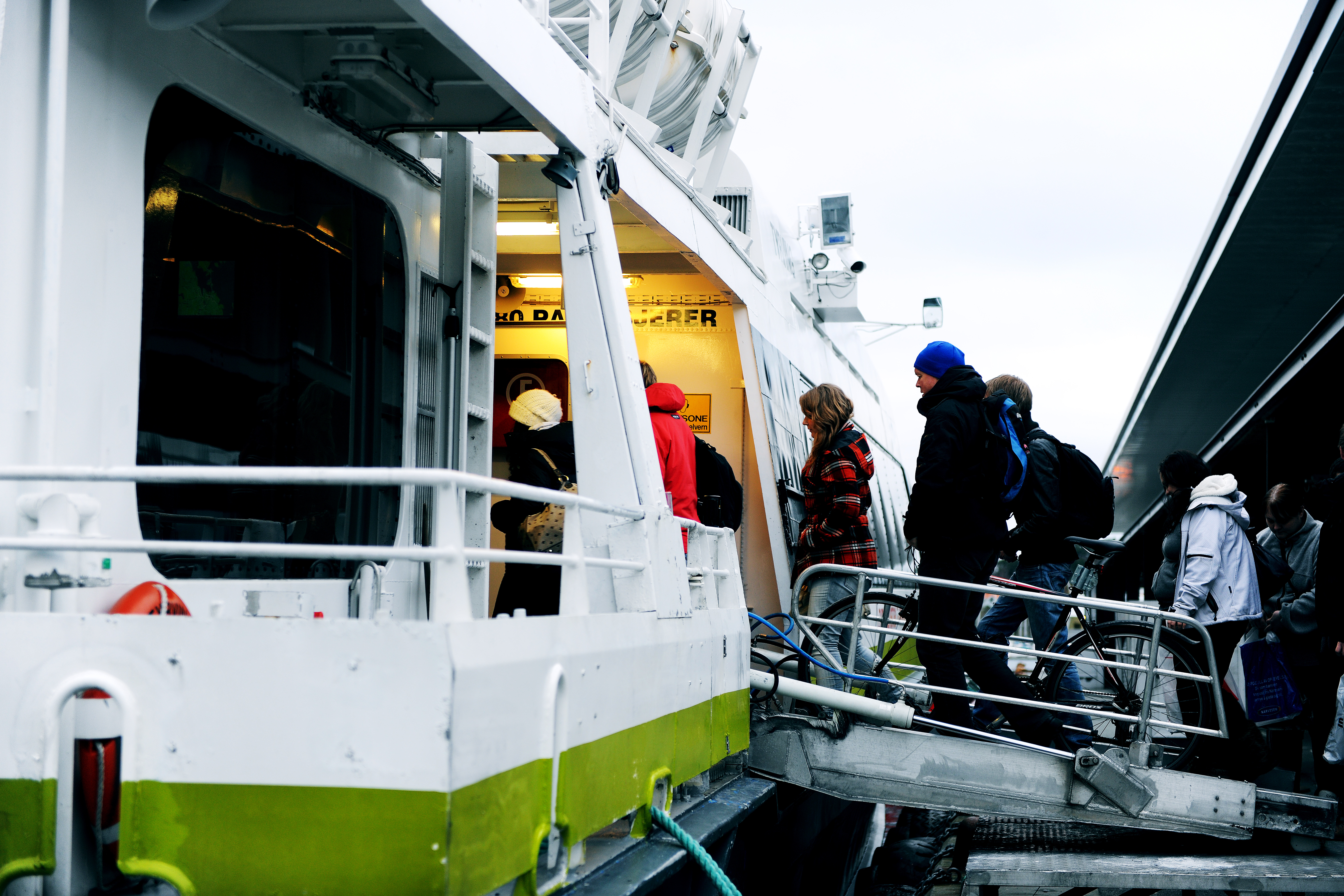 Hurtigbåtene som går fra Fiskepiren anløper Byøyene, Hommersåk og flere titalls kaier i Ryfylke. Flaggruten til Bergen via Haugesund går også herfra.